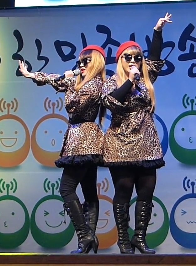 대한민국의 2인조 그룹 미미시스터즈